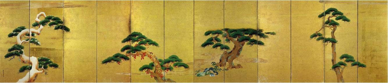 Pins des quatre saisons du peintre Kanō Tannyū (17e siècle). 156,5 × 367cm. couleur or sur papier.